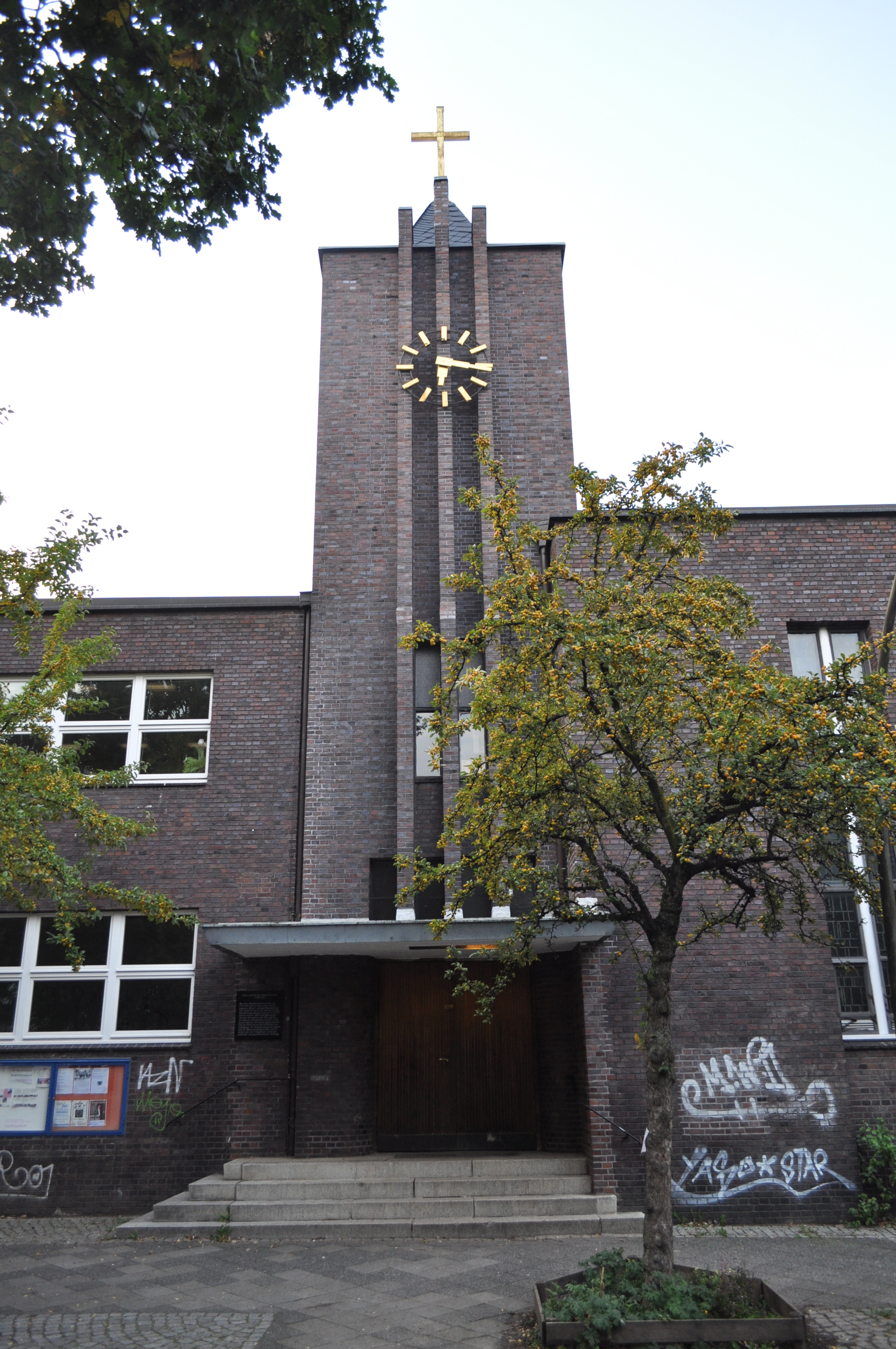 Osterkirche in Hamburg-Ottensen. This is a photograph of an architectural monument.